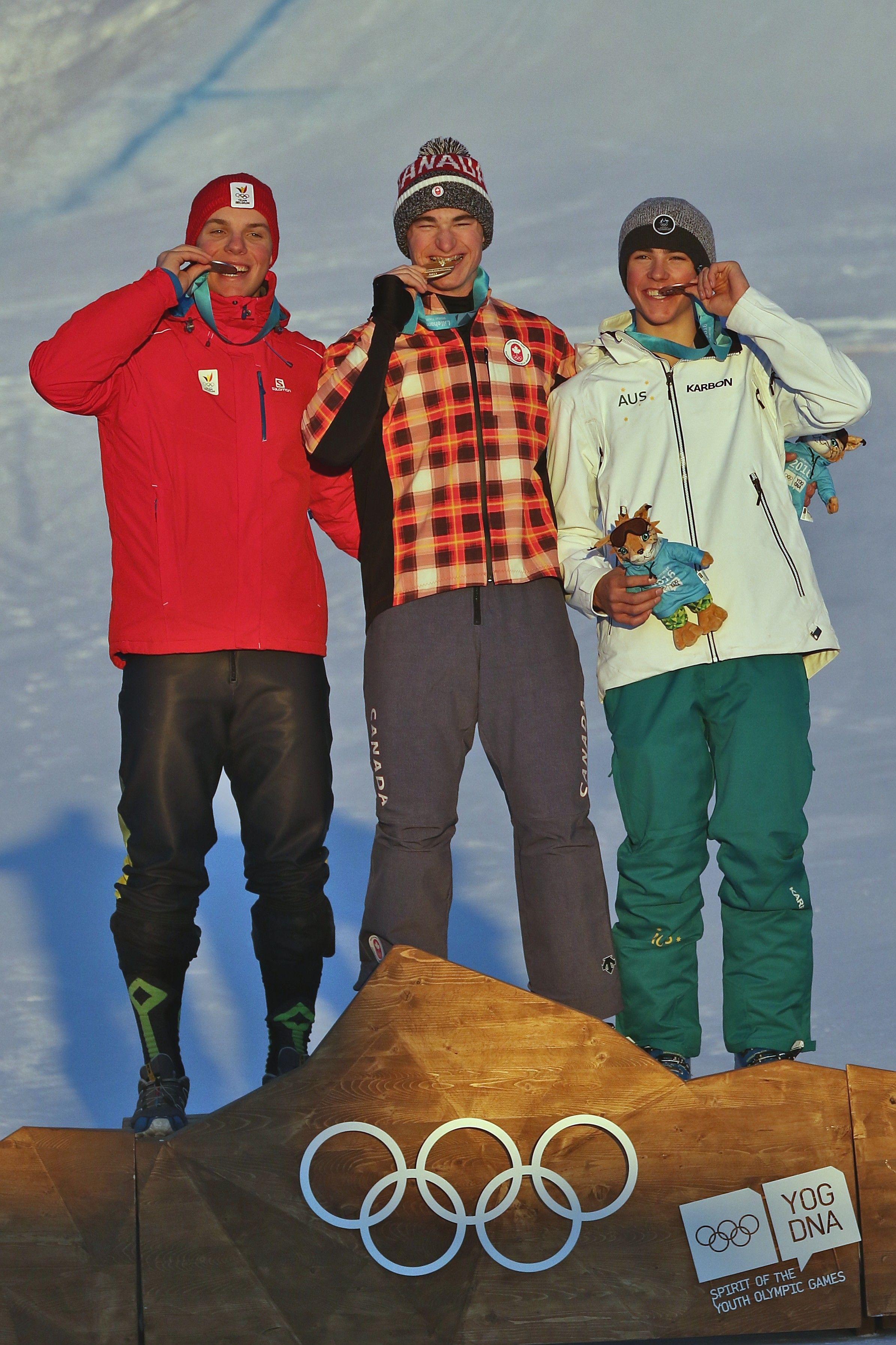 Lillehammer 2016 Ski cross - Reece Howden (CAN, gold), Xander Vercammen (BEL, silver), Louis Muhlen (AUS, bronze)